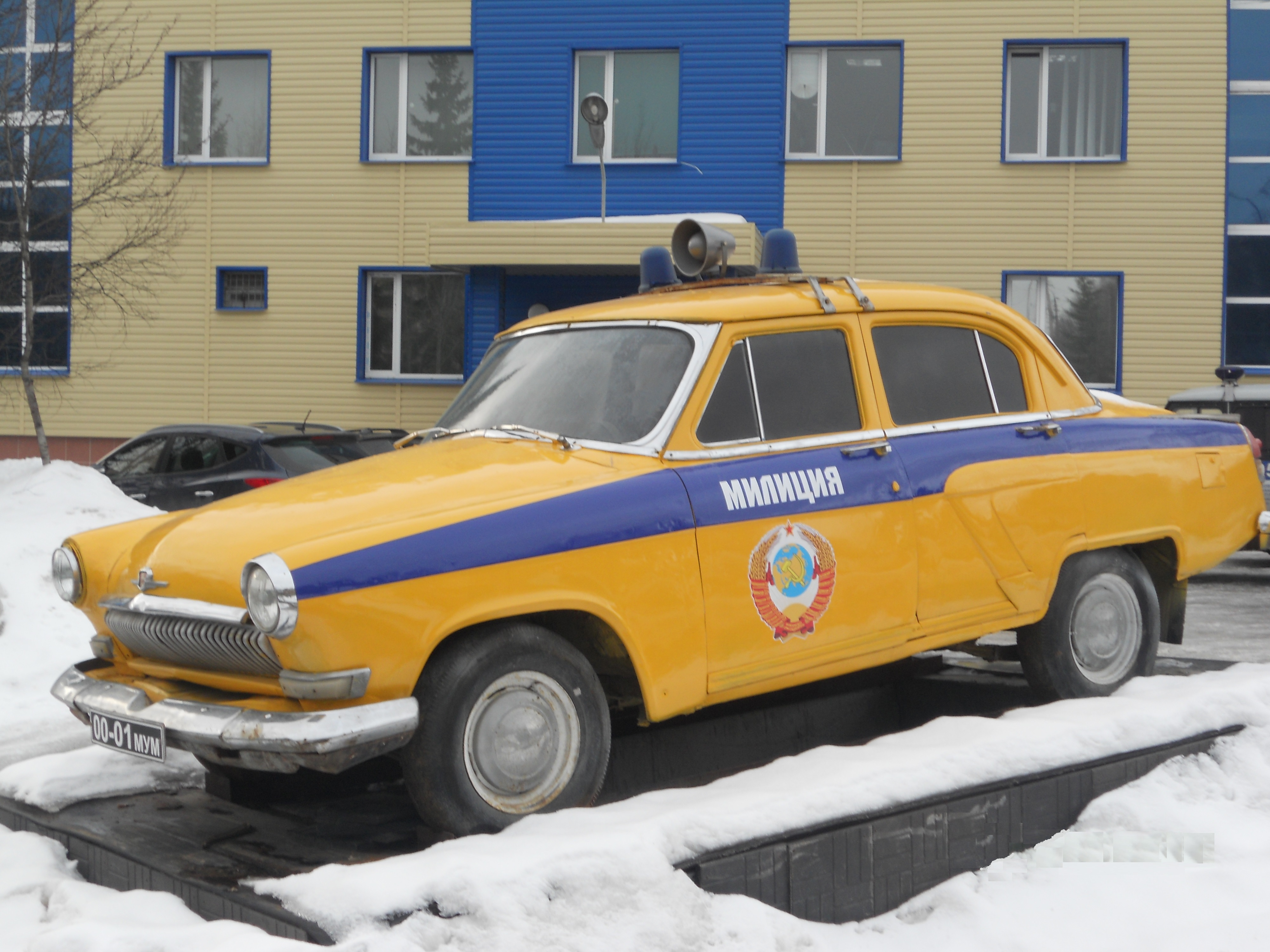 Милицейская Волга ГАЗ-21